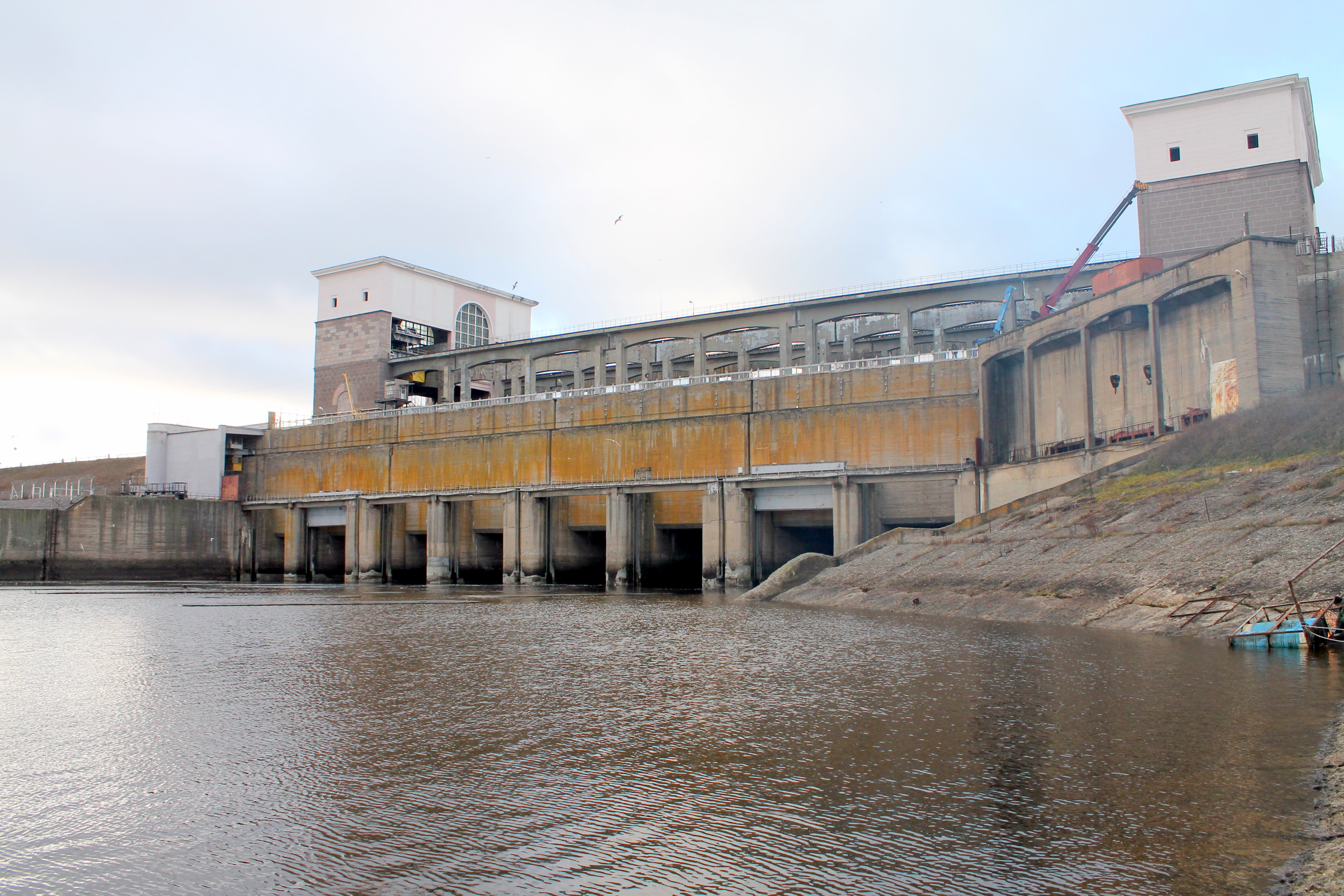 Водосбросная плотина Рыбинской ГЭС, вид с нижнего бьефа